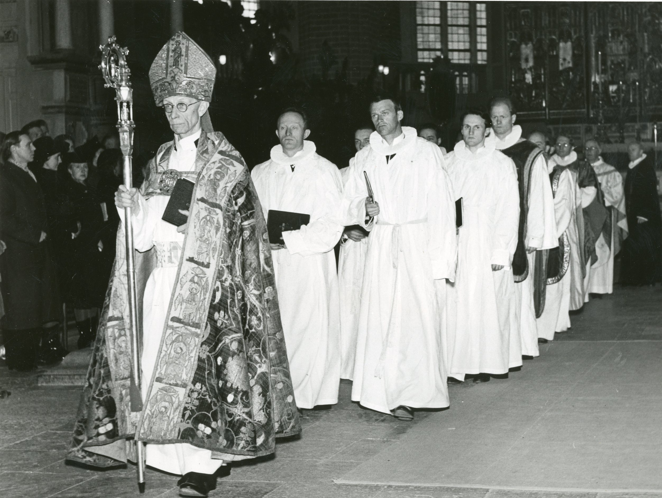 Kirkehøytideligheten i Strängnäs 19/3-44 hvor 4 norske prester fikk sin vigsel blev en av de store begivenheter i norsk flyktninghistorie i Sverige. Bildet viser presteprosesjonen med biskop Aulén i spissen. RA/PA-1209/Uc/67/1/S 5001